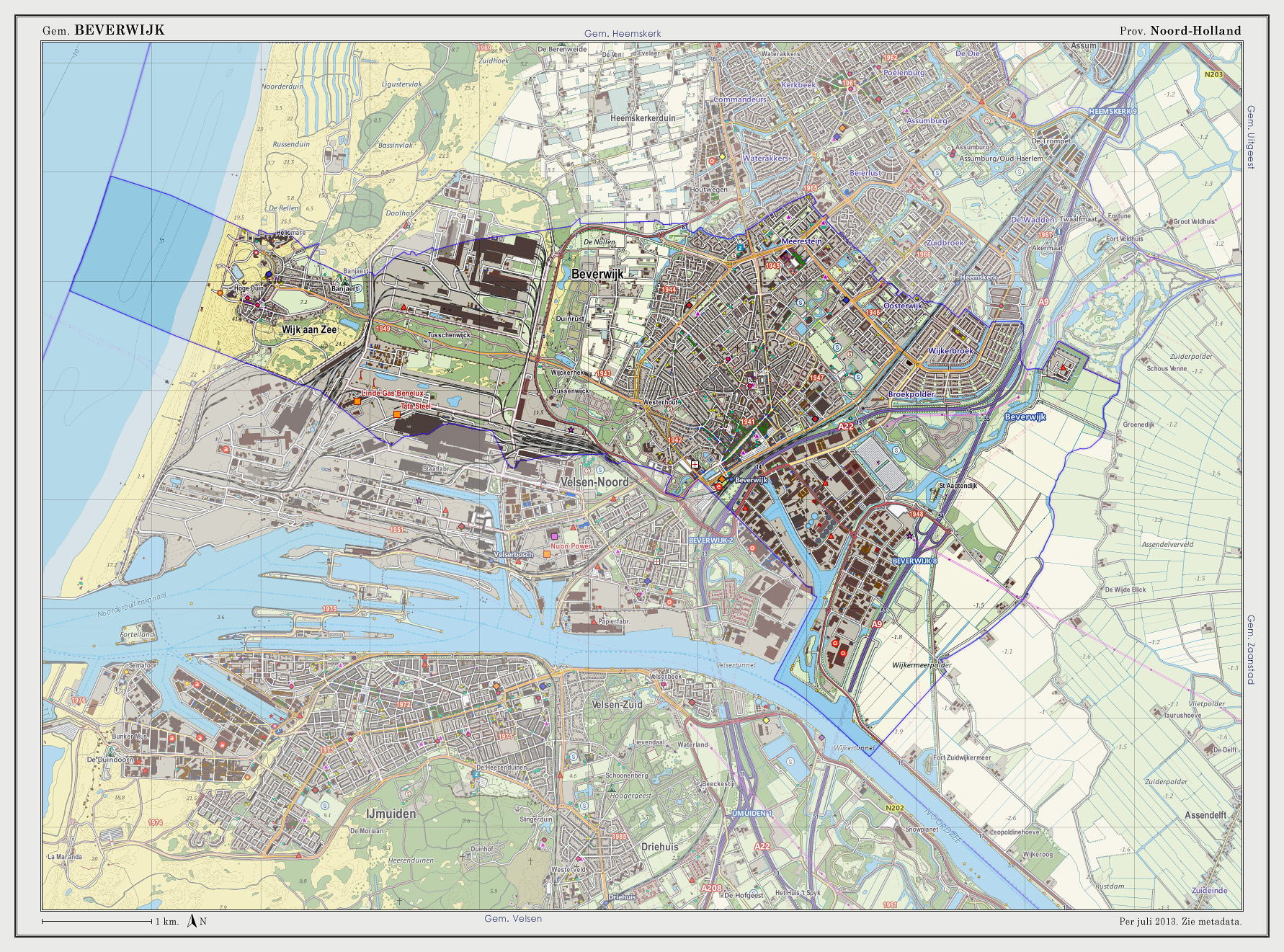 Topografische kaart van gemeente Beverwijk (2013). Samengesteld door user:janwillemvanaalst op basis van de GML open geodata van de BRT/Top10NL (basisregistratie Topografie, Kadaster 2011), vrijgegeven door Kadaster onder de Creative Commons BY licentie. Additionele gegevens uit BAG (8 juli 2013), uit de Open Street Map (9 juli 2013) en uit de Risicokaart. Peildatum kaartbeeld: 9 juli 2013. Samenstelling en kleurenschema: Jan-Willem van Aalst, met QuantumGIS en Photoshop. Zie ook de Legenda.